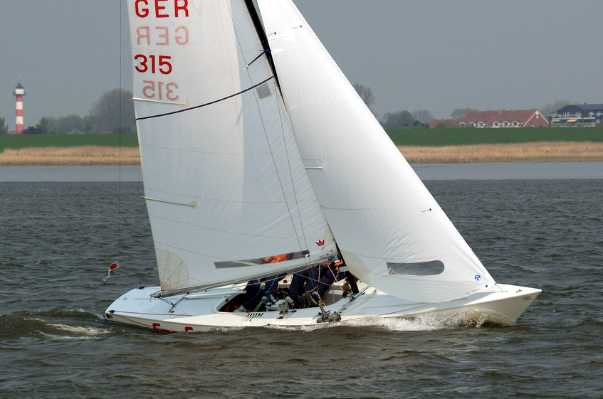 Soling